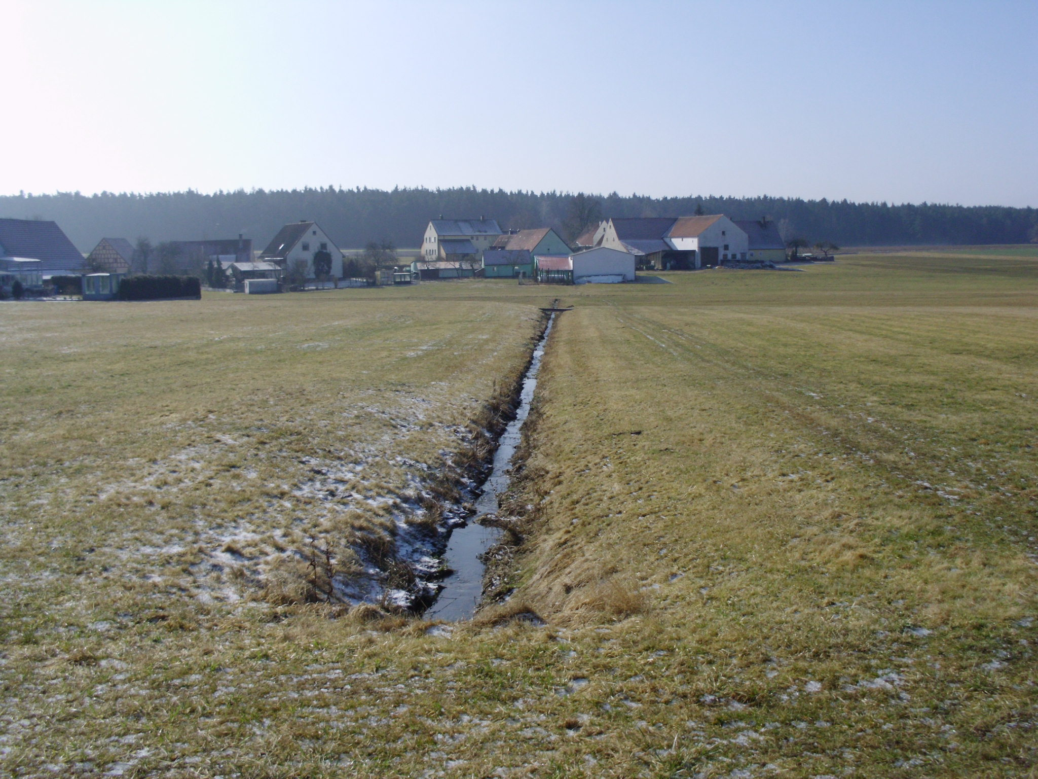 Oberhambach, Ortsteil von Gunzenhausen im mittelfränkischen Landkreis Weißenburg-Gunzenhausen, Bayern